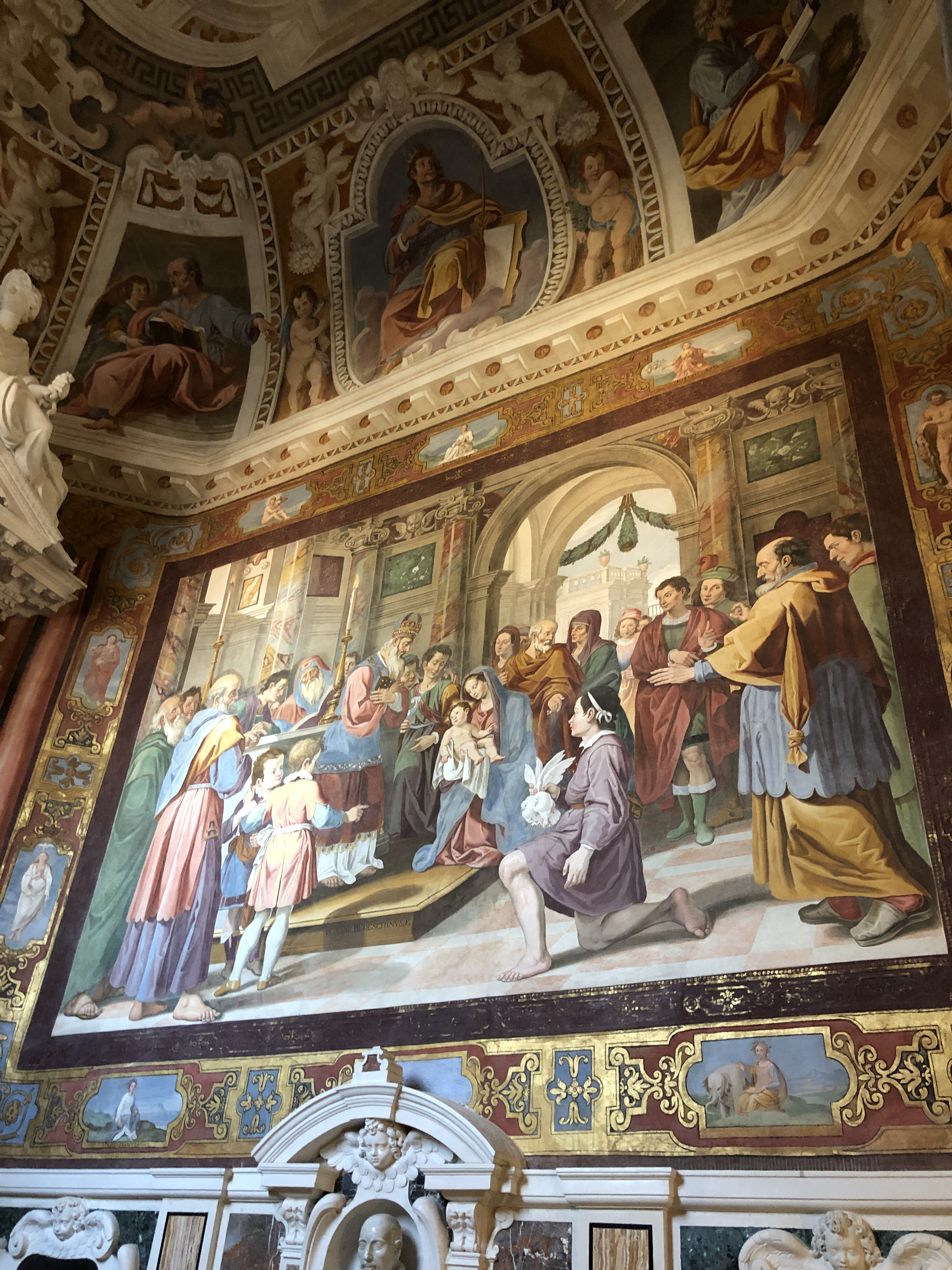 Cappella Branconio nella chiesa di San Silvestro. Particolare della parete destra - "Presentazione di Gesù al tempio" di Bedeschini